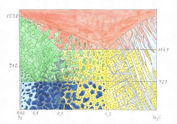 A vas-szén állapotábra szövetszerkezetekkel bővített diagramja